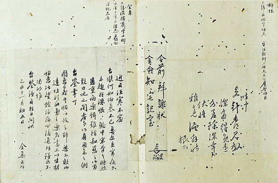 유근과 김집이 청음 김상헌에게 보낸 서신